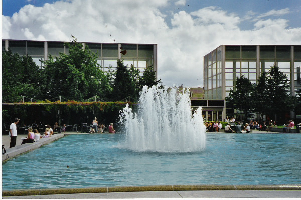 Park i MK Centre, Milton Keynes, England. Foto Cnyborg, juli 2003.